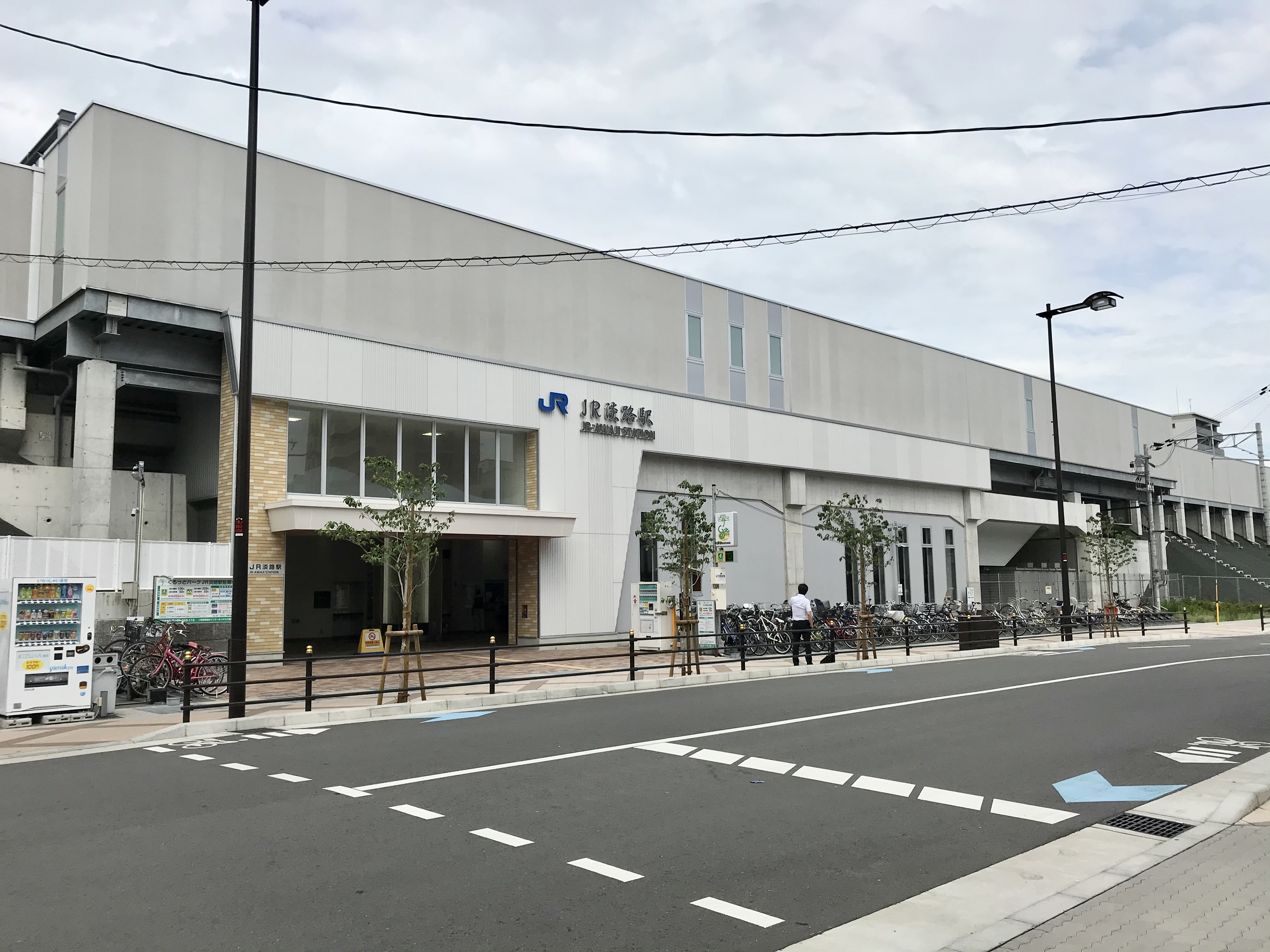 JR西日本おおさか東線JR淡路駅西口